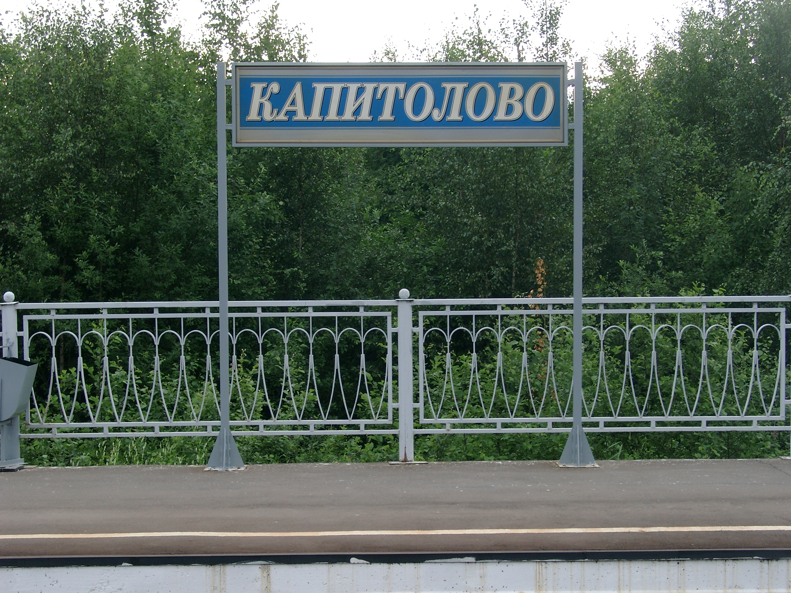 Станция Капитолово. Указатель с названием образца 2008 г.